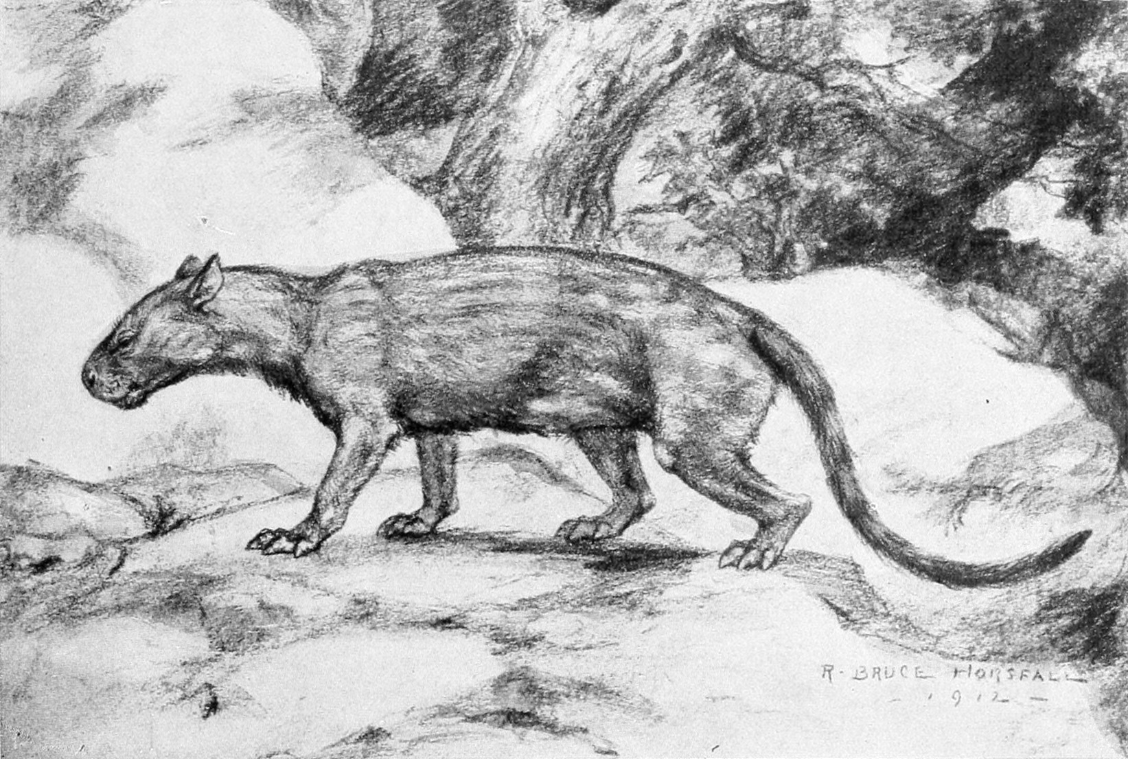 Pantolambda bathmodon.